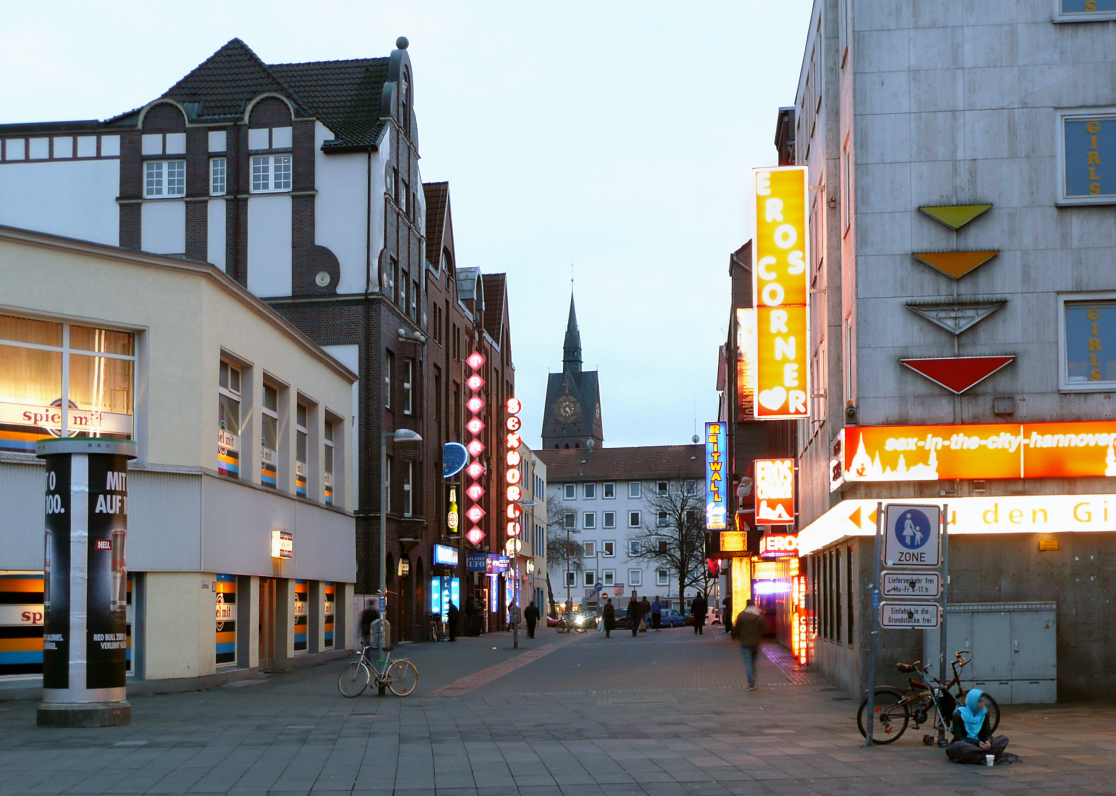 Reitwallstrasse